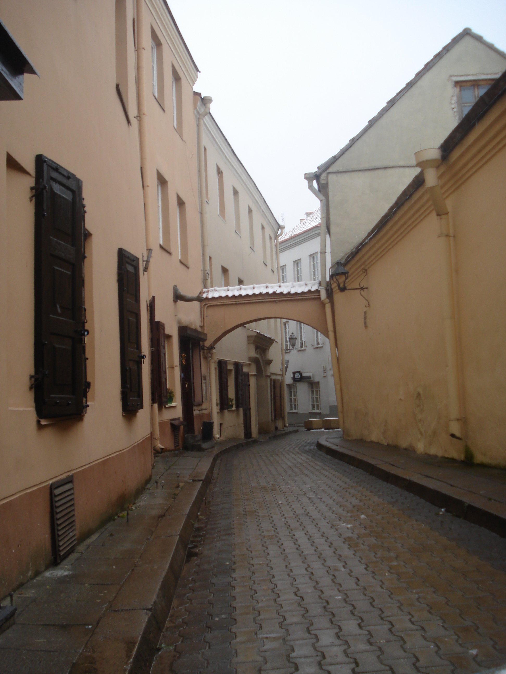 M. Antokolskio gatvė in Vilnius